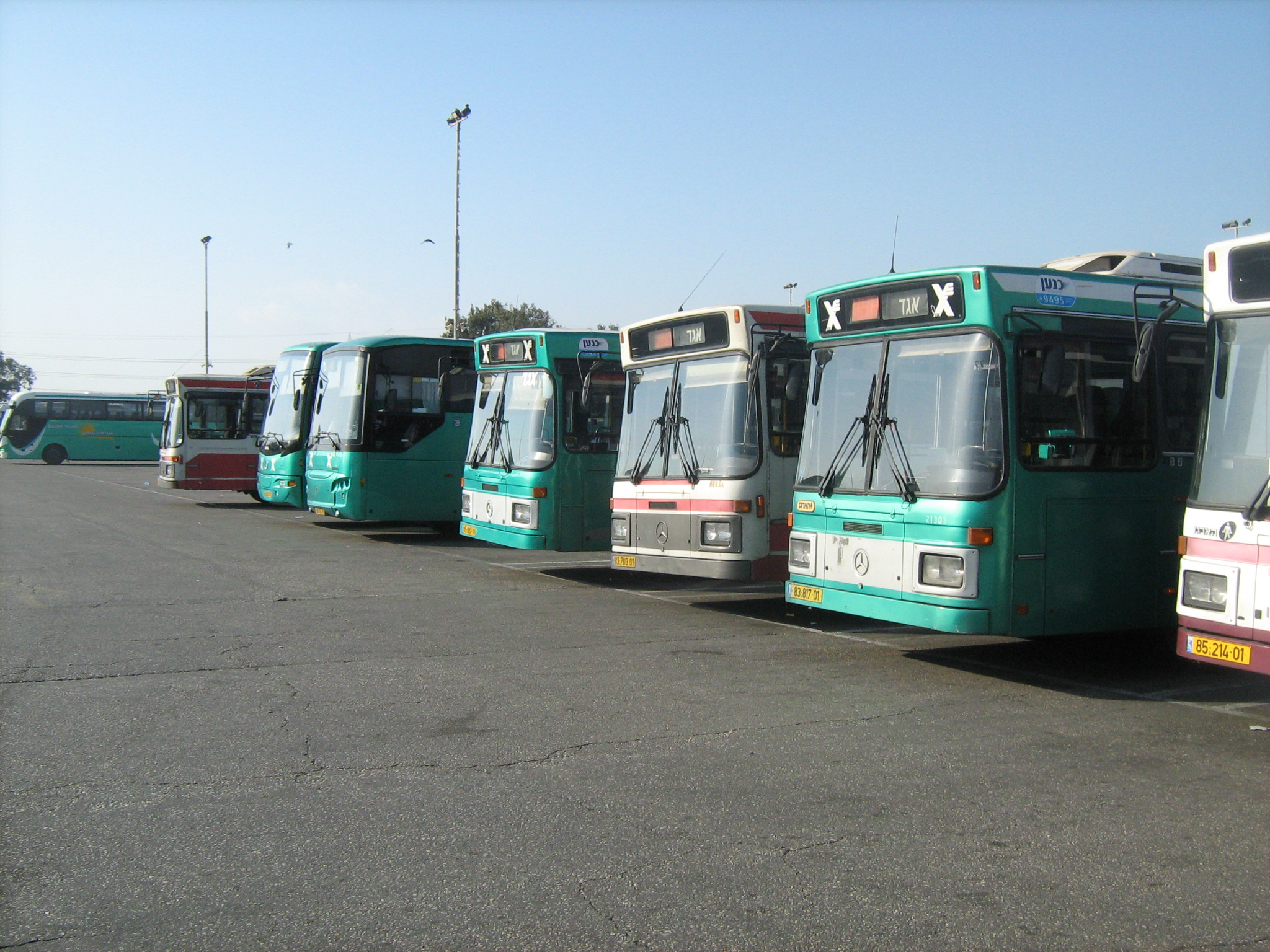 חניון אגד בחולון